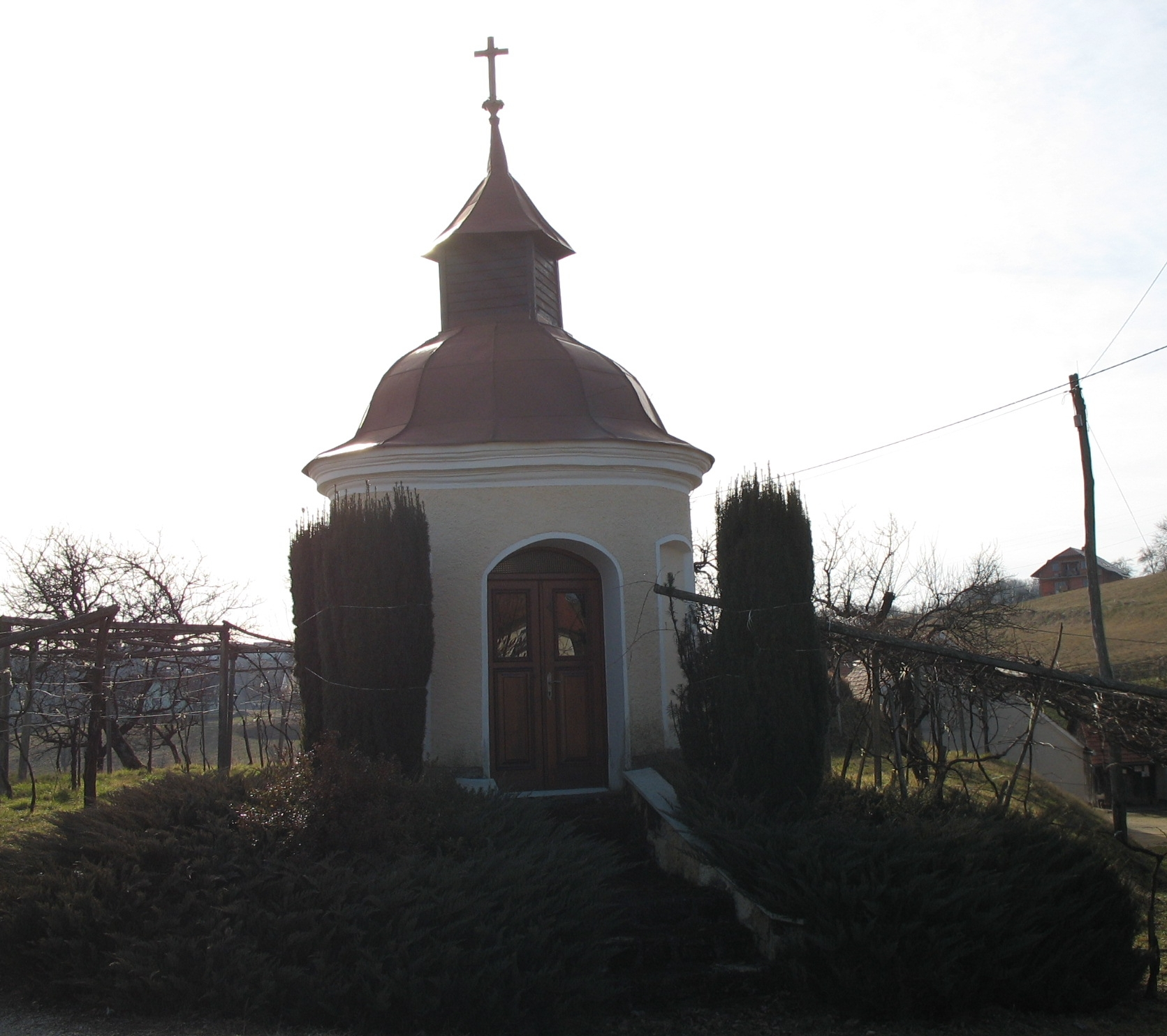 Kapelica pri hiši Zavrh 71